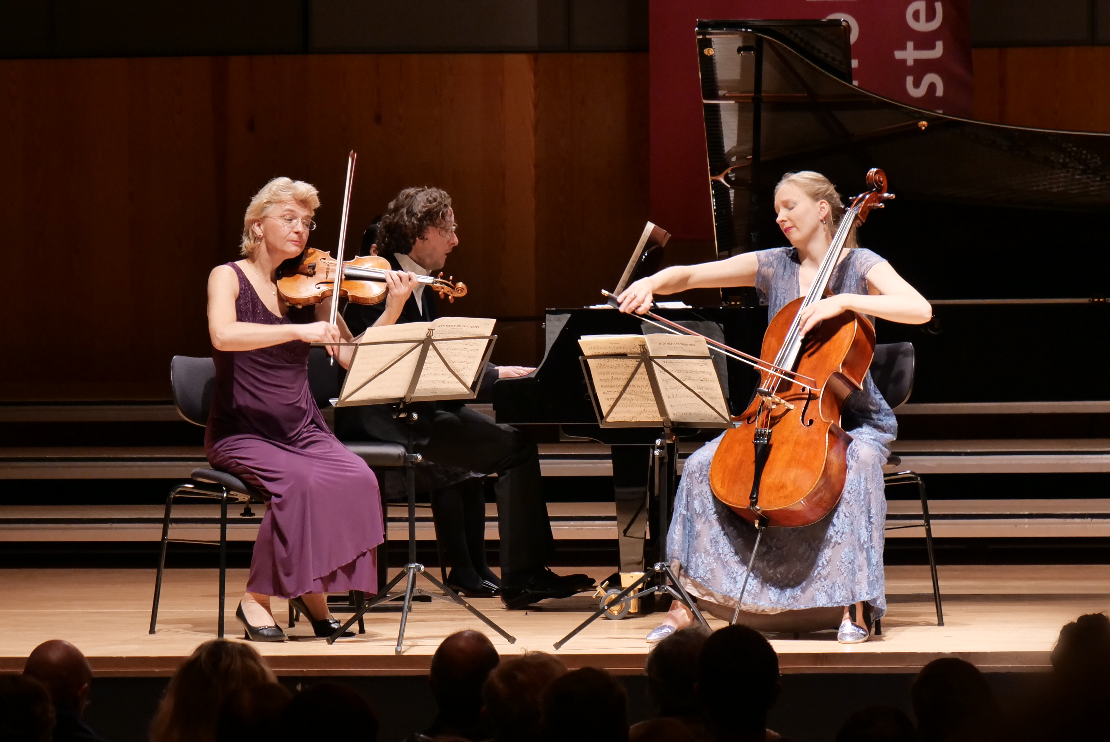 Antje Weithaas (Violine), Martin Helmchen (Klavier) und Marie-Elisabeth Hecker (Violoncello) beim Meisterkonzert am 29.10.2019 im Konzerthaus der HfM Detmold. Lizenz | license: CC BY-SA 4.0